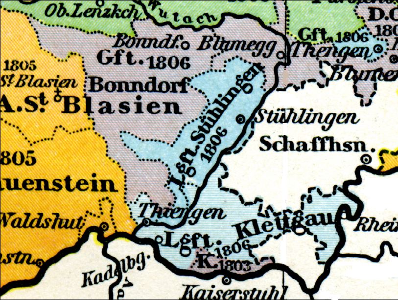 Karte mit der Landgrafschaft Klettgau um 1806